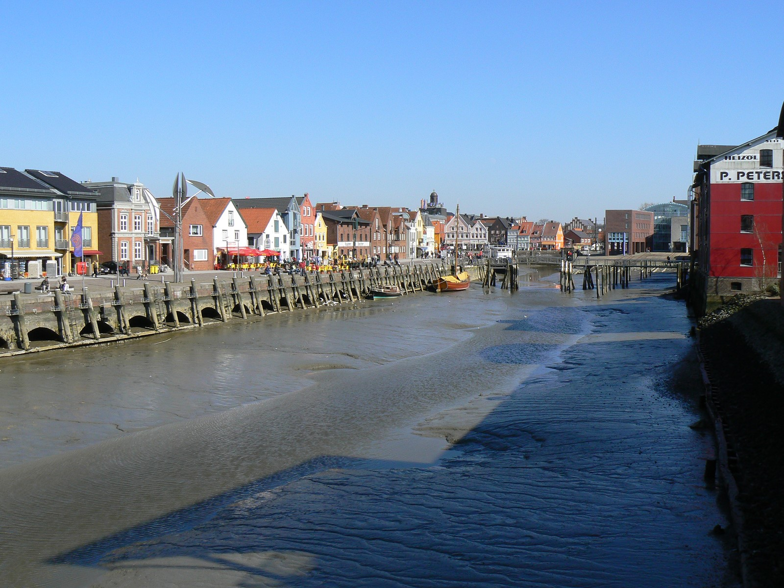 Husumer Innenhafen bei Niedrigwasser. Blick Richtung Hafenspitze.